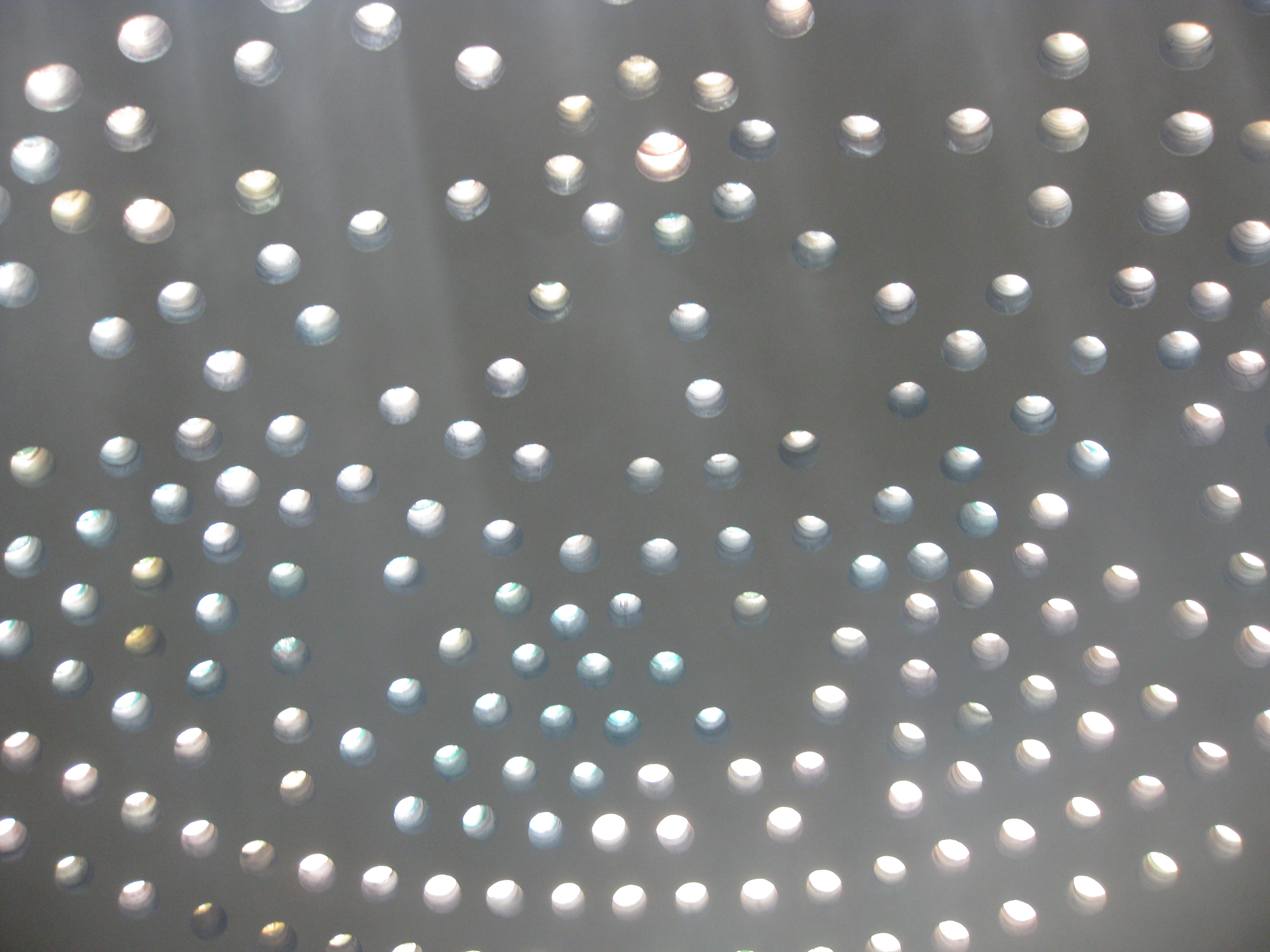 Acco (Acre, Akko) - Hamam el Basha (Hamam el Pasha) עכו חמאם אל באשה (חמאם אל פאשה) - בית המרחץ התורכי